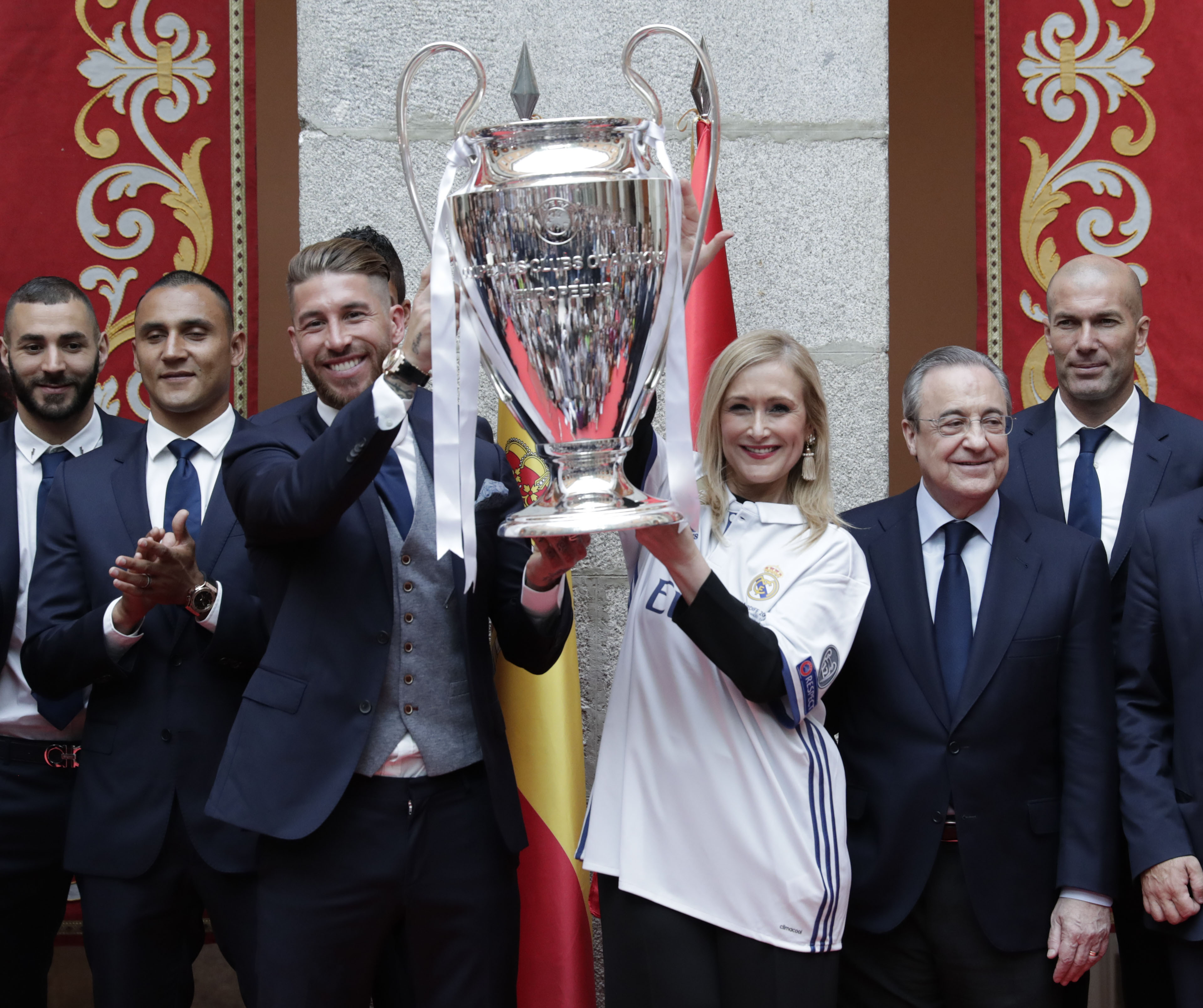 He tenido el gran honor de recibir de nuevo al Real Madrid que ha querido compoartir con todos los madrileños esta copa. Antes de nada guardamos un minuto de silencio en recuerdo de las víctimas del atentado de #Londres y quiero mostrar mi cariño, apoyo y solidaridad a las víctimas y sus familiares. Ya tenemos en la casa de todos los madrileños la réplica de la Champions y la camiseta de los campeones. Esta #Champions convierte la historia de este equipo en una historia inédita de triunfos en el fútbol mundial. En menos de dos años han ganado un Mundial, Supercopa, Liga y dos Champions. Quiero felicitar al real Madrid en nombre de los madrileños y españoles, ya que dejáis el nombre de Madrid y de España muy alto. Para mí es un honor lucir la camiseta del real Madrid que me habéis regalado porque representa tolerancia, compañerismo y la grandeza" Es un día histórico para el fútbol y muy positivo para el nombre de Madrid